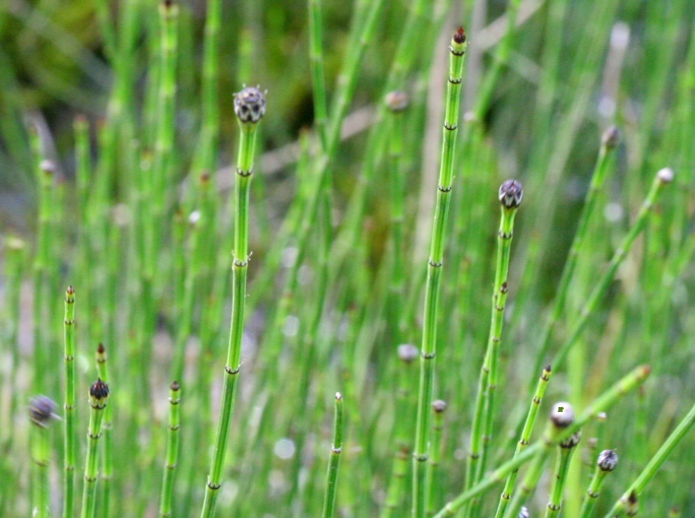 Equisetum_variegatum (Equseto variegato) Località : Giardino Botanico Alpino "Giangio Lorenzoni", Pian Cansiglio, Tambre d'Alpago (BL), 1000 m s.l.m.